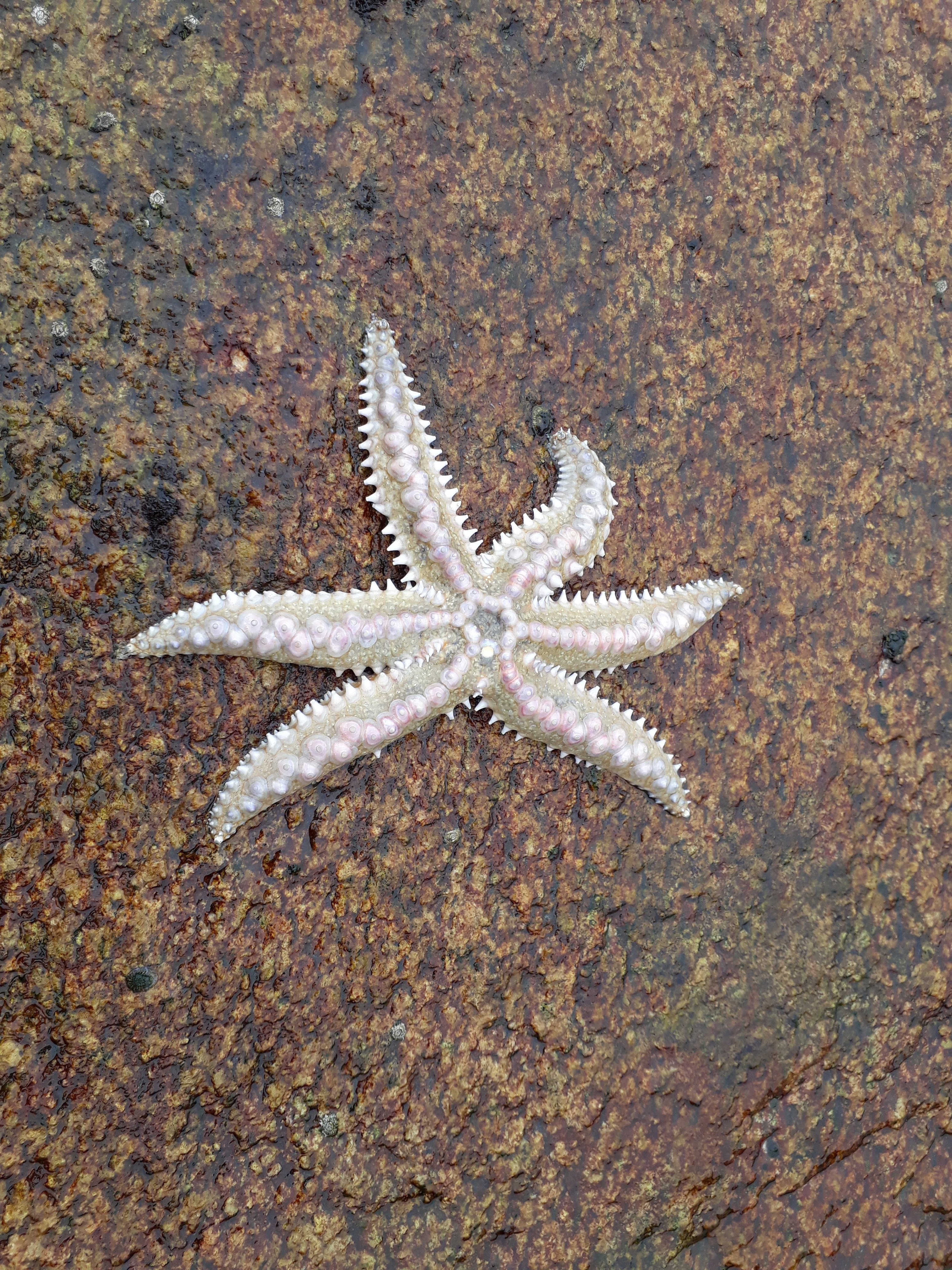 Estrella de mar espinoza en Playa El Tebo, Horcón.